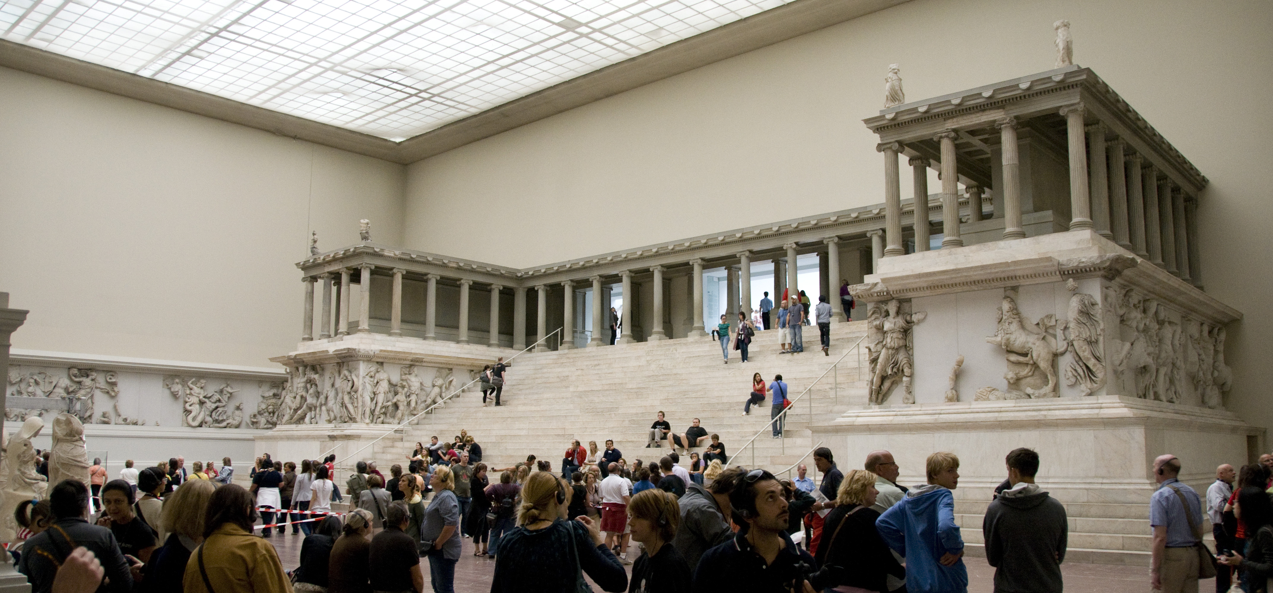 Altar van Zeus in het Pergamonmuseum, Berlijn